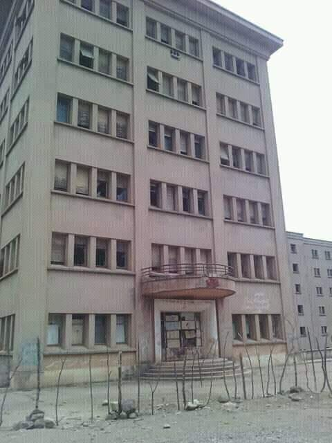 IBEN SAMIM